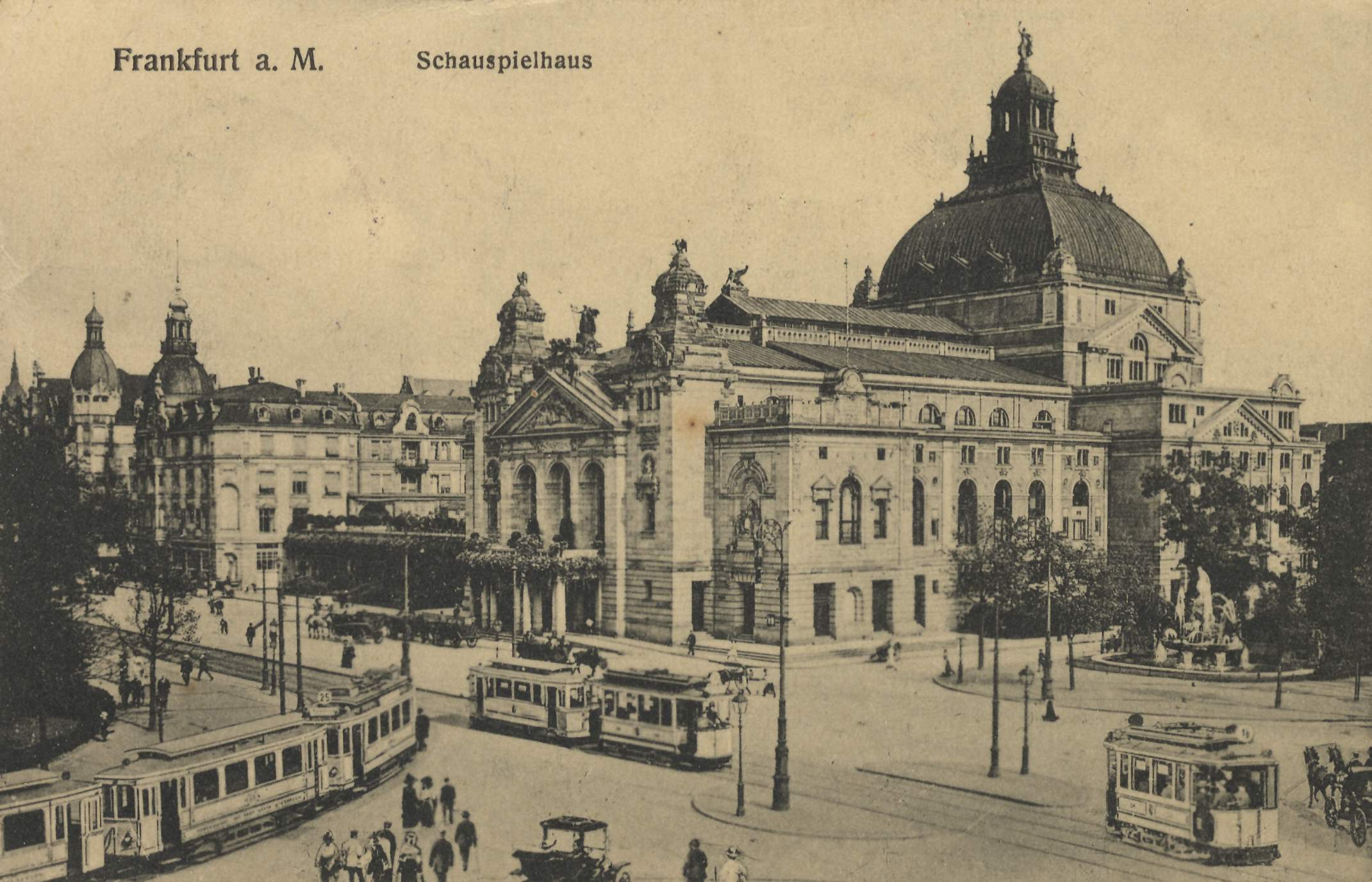 Das Schauspielhaus, erbaut 1902, 1944 durch Bomben schwer beschädigt. Seit 1951 Spielstätte der Oper Frankfurt, Fassade 1959 bis 1962 komplett erneuert. Historisches Foto von 1914. Urheberrechte bestehen aufgrund des Alters keine mehr.